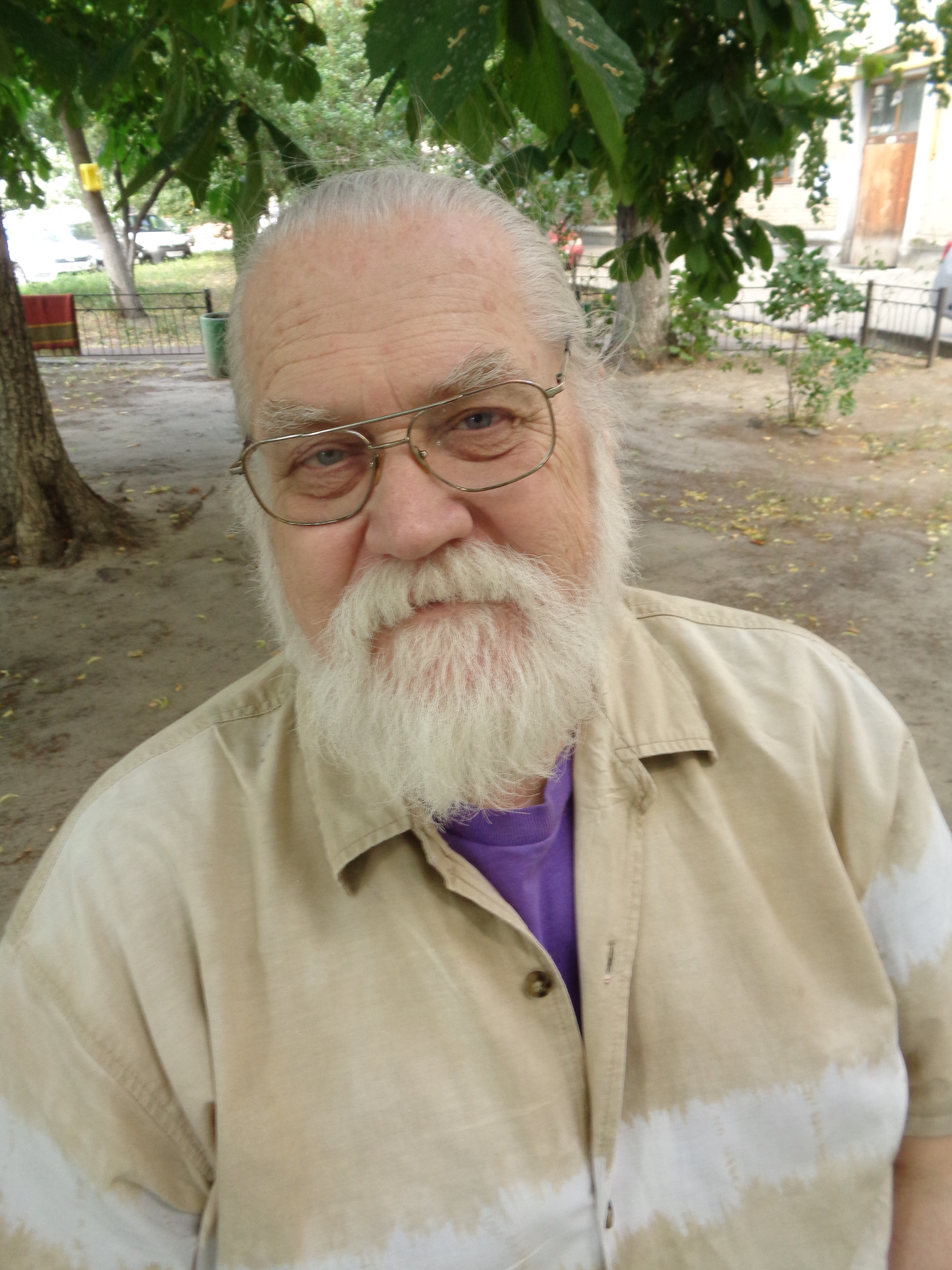 Богдан Жолдак 2017 рік